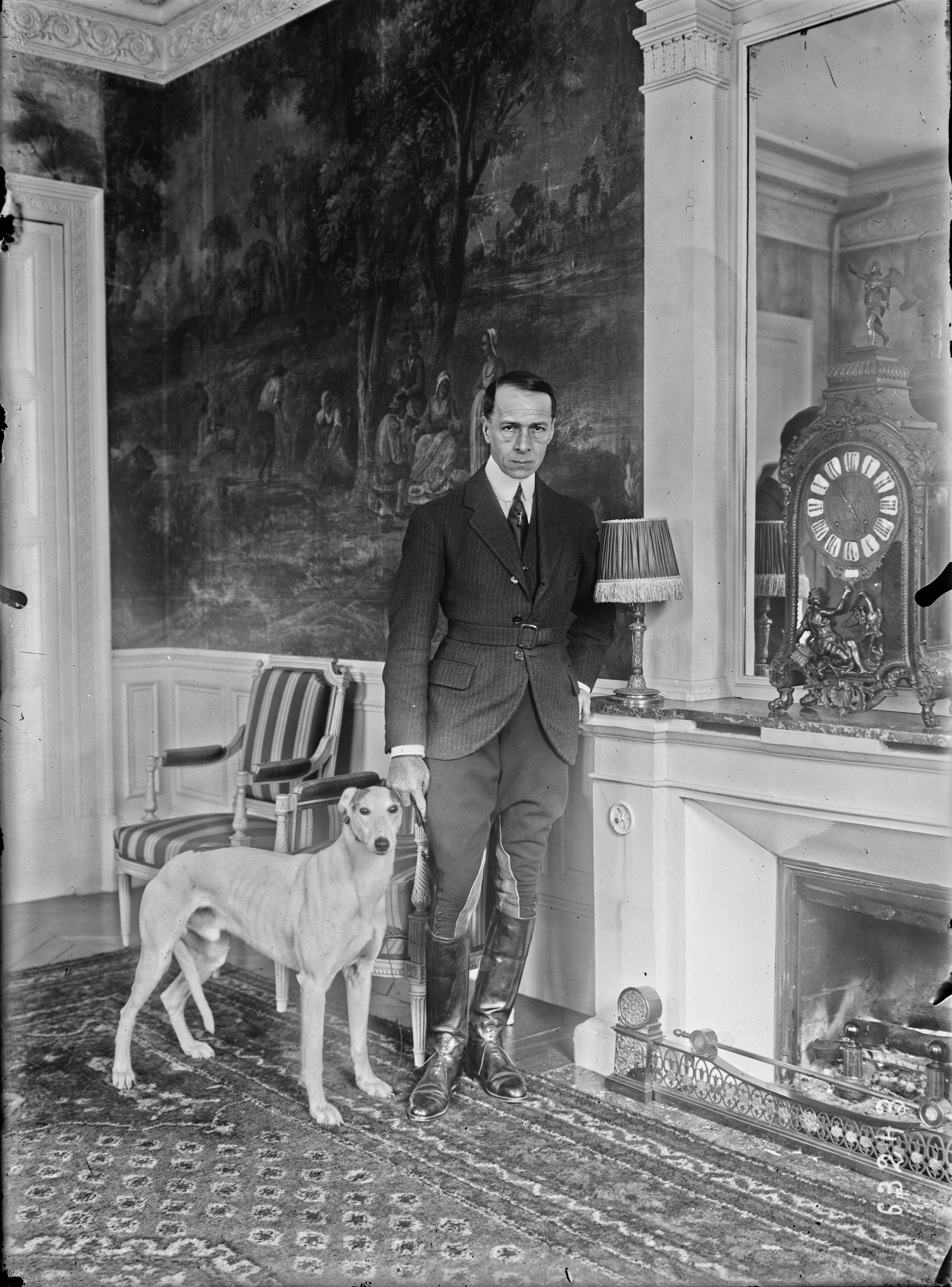 Marcel Boulenger posant avec son chien.